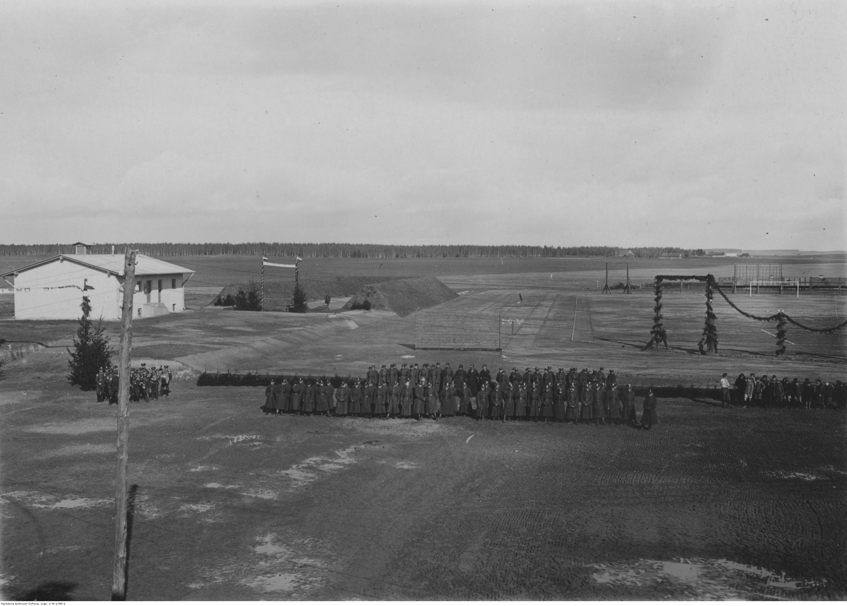 Obchody X- lecia istnienia Korpusu Ochrony Pogranicza w Batalionie KOP "Snów". Boisko sportowe i strzelnica batalionu otwarte i poświęcone w dniu święta X-lecia.